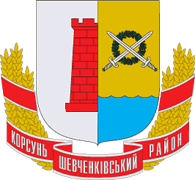 Герб Корсунь-Шевченківського району